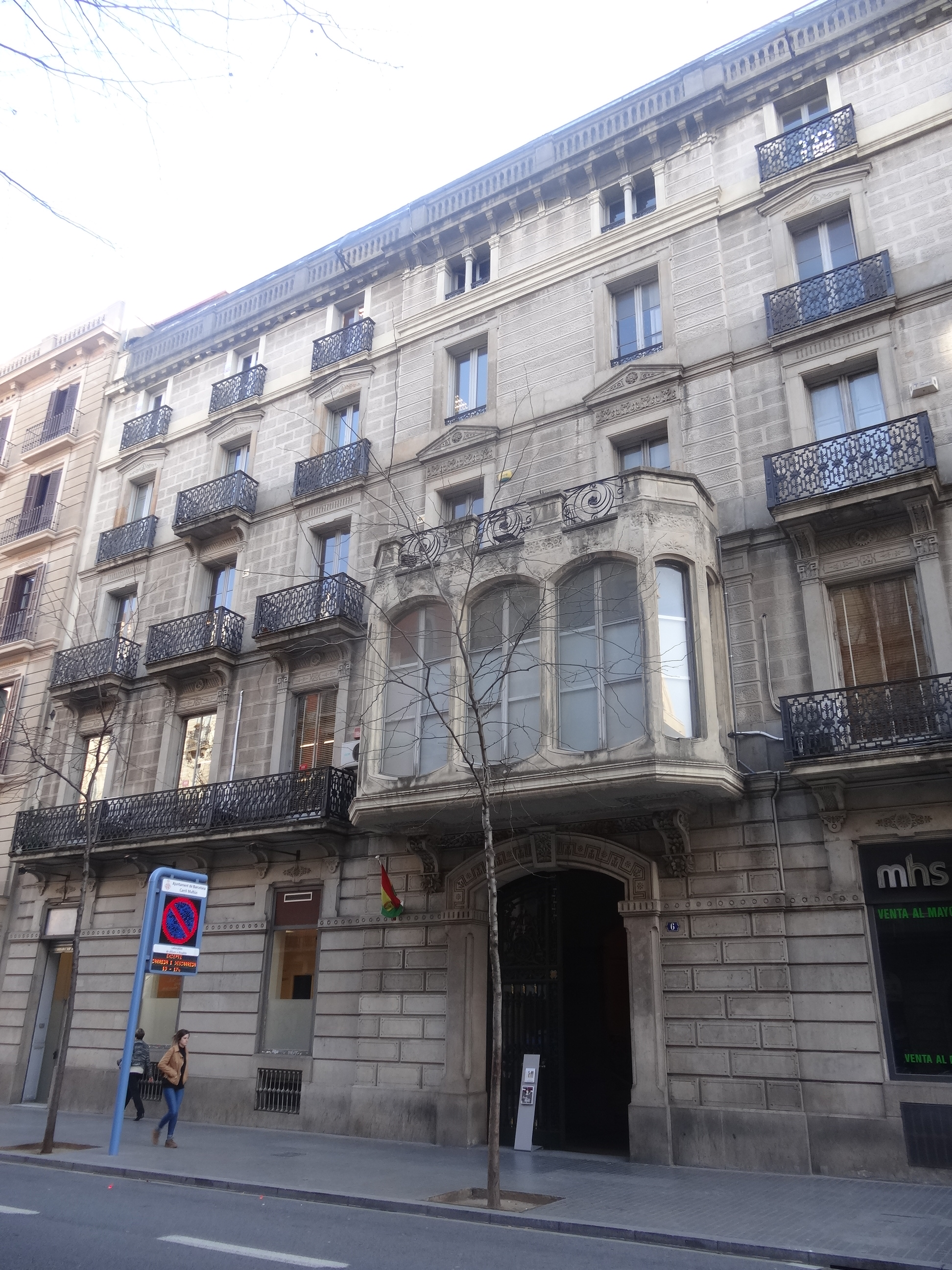 Carrer de Trafalgar, 6 Barcelona